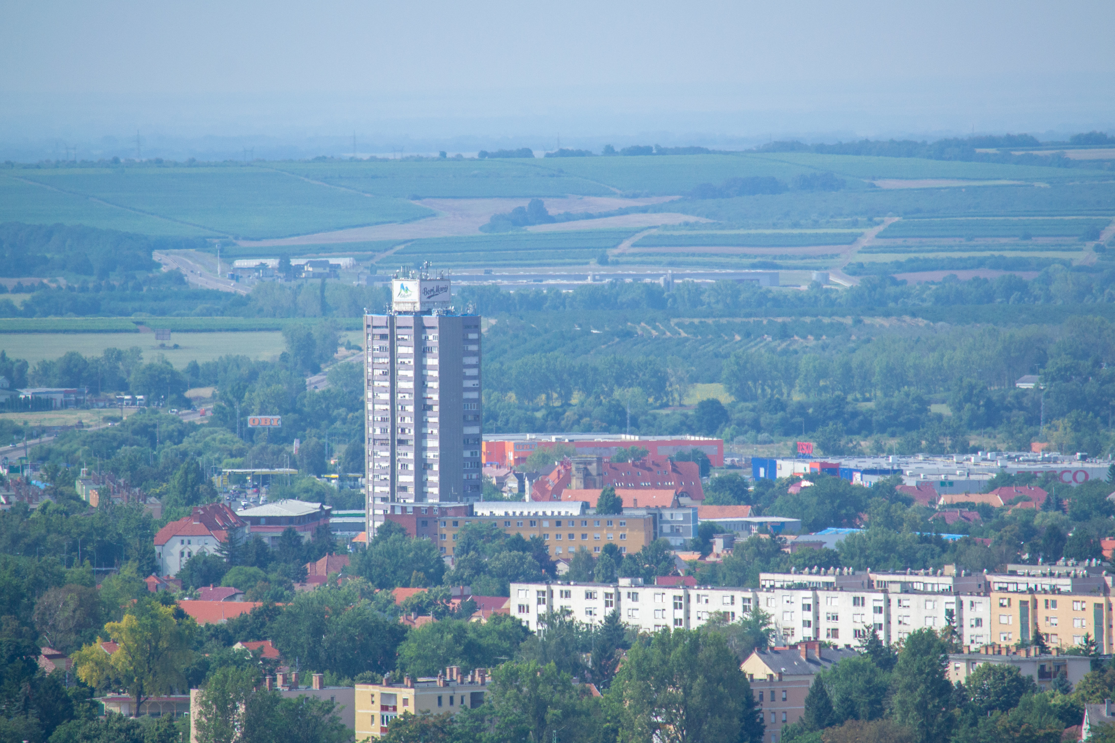 A gyöngyösi toronyház, a magasból